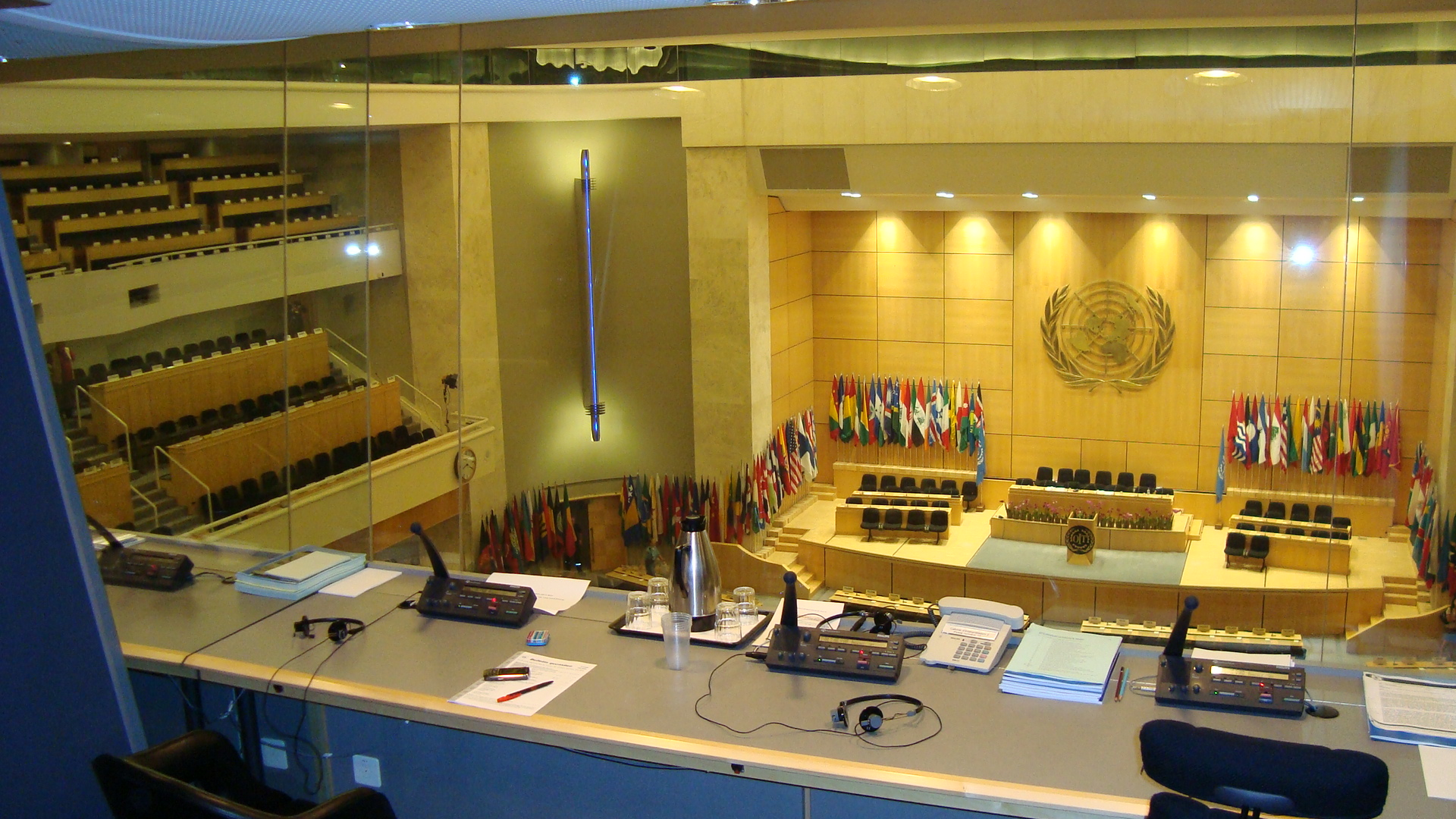 Salle des Assemblées, ONU Genève, vue de la cabine d'interprétation